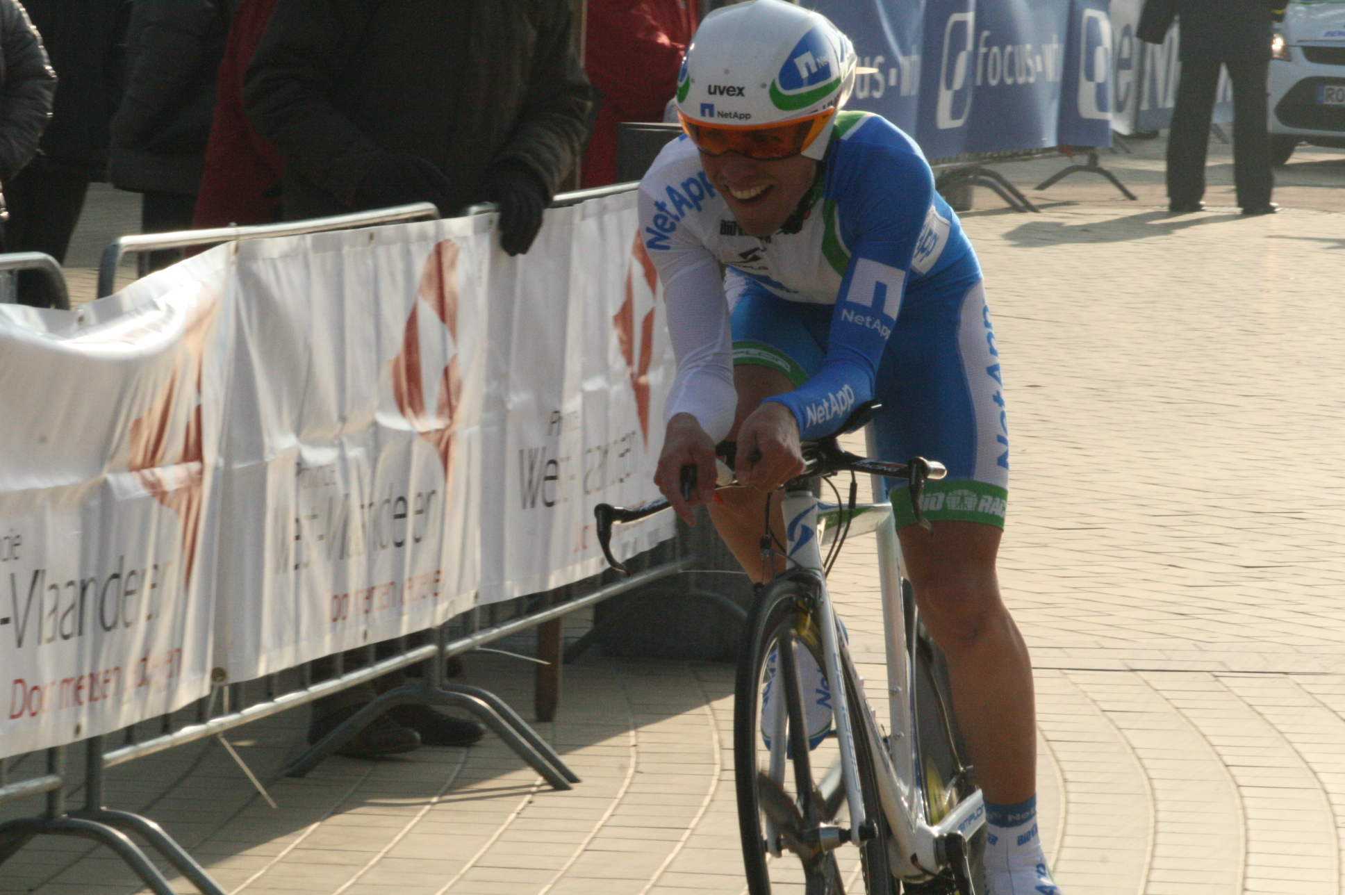 Driedaagse van West-Vlaanderen 2011, proloog in Middelkerke